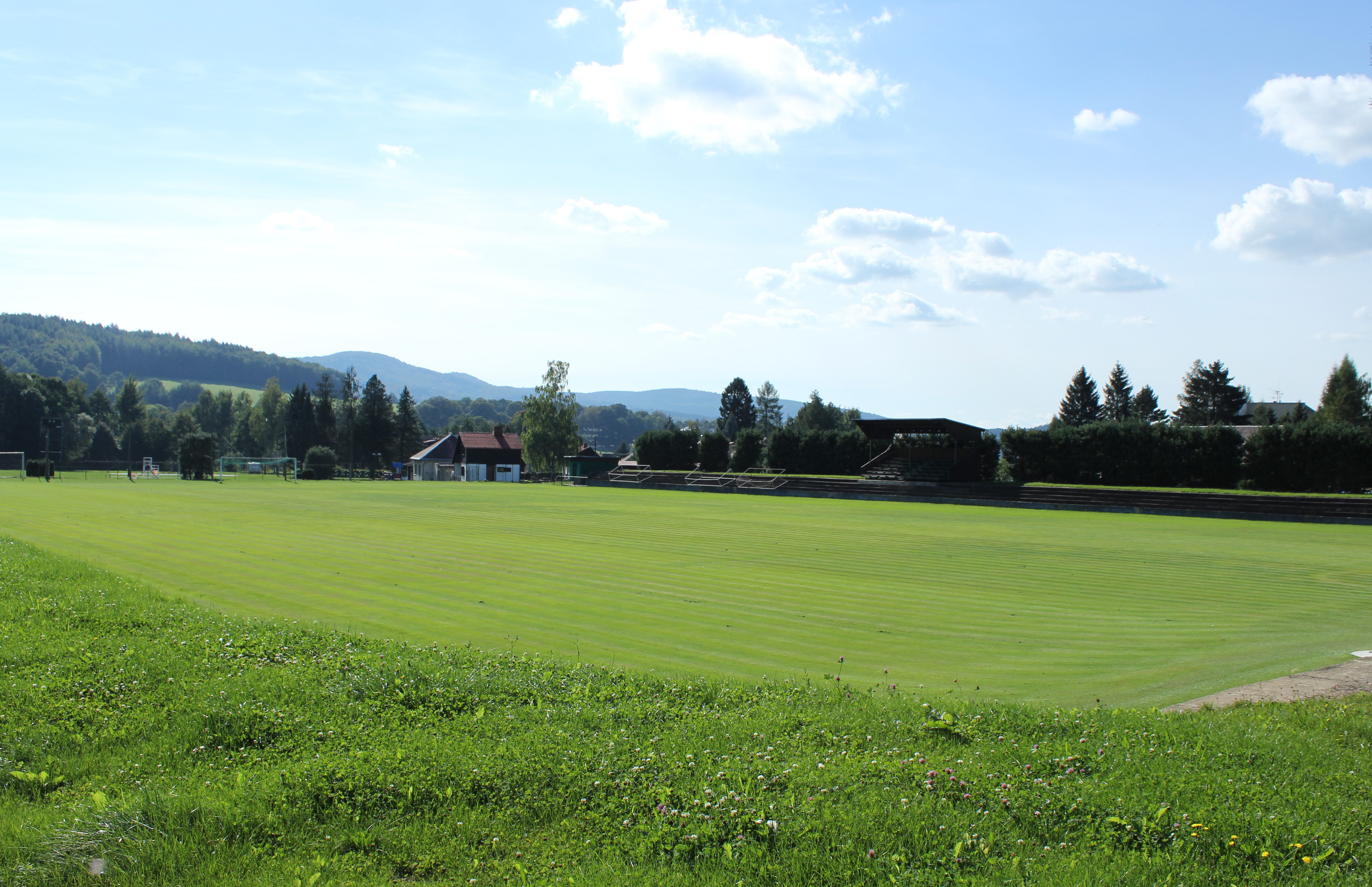 Fotbalové hřiště v Raspenavě.